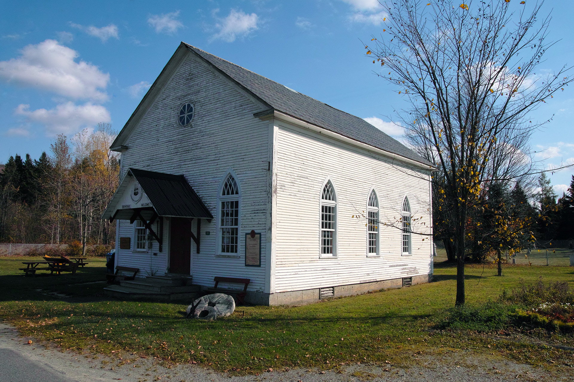 Site historique des Églises-de-Kinnear's Mills, Rue des Églises, Kinnear's Mills (Canada). (Protection SH reconnu. Voir la liste des lieux patrimoniaux de la Chaudière-Appalaches pour plus de détails).